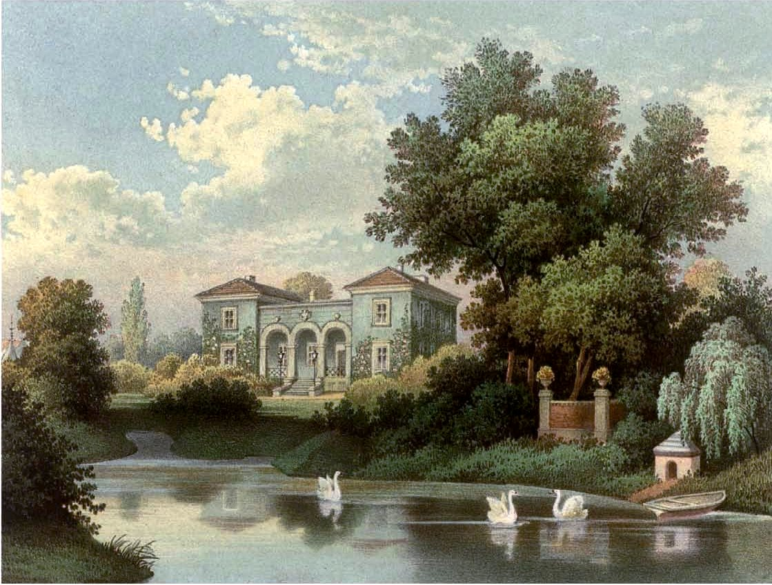 Gut in Markowice